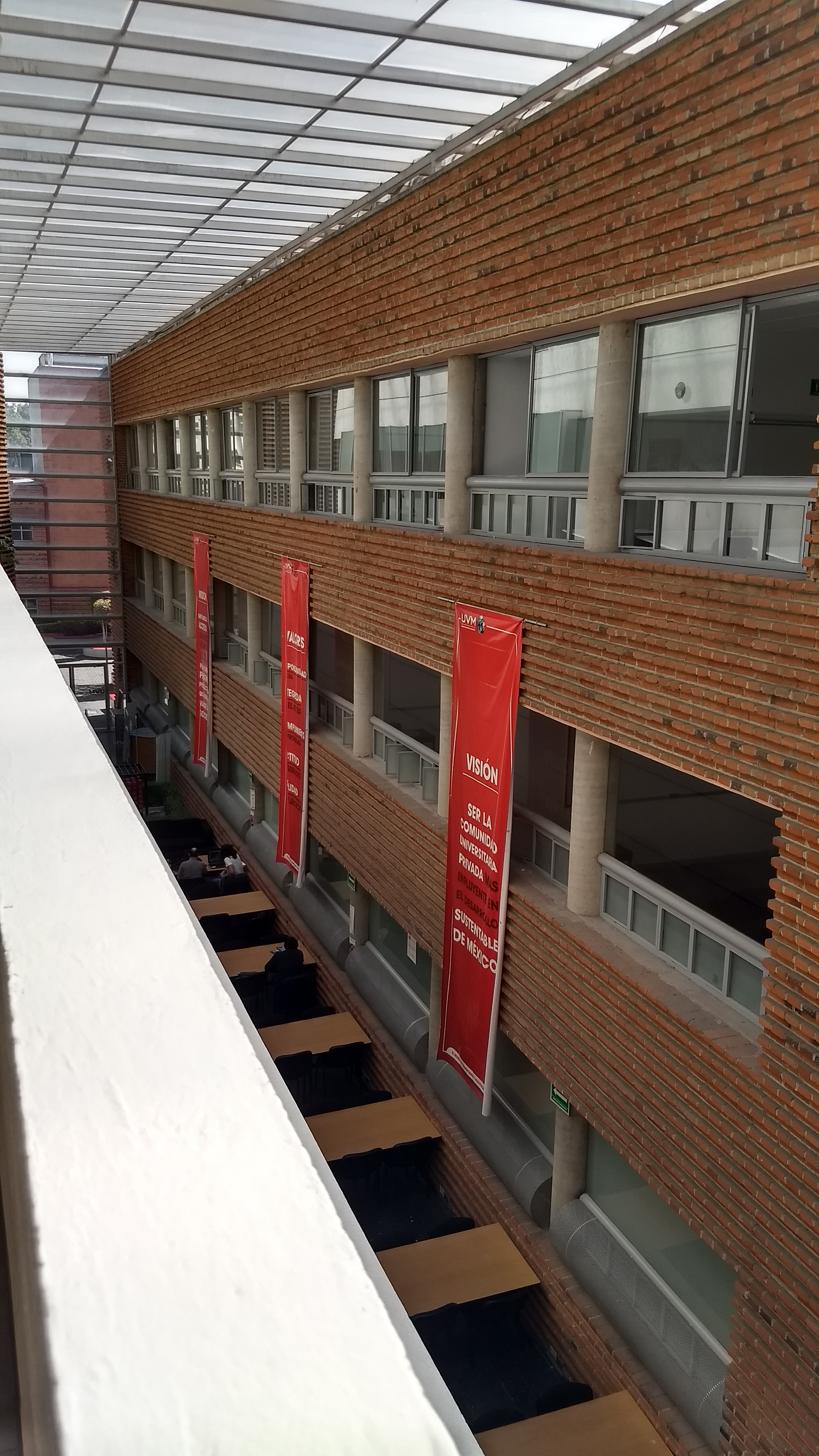 Vista desde arriba de una parte de la Biblioteca UVM Tlalpan.